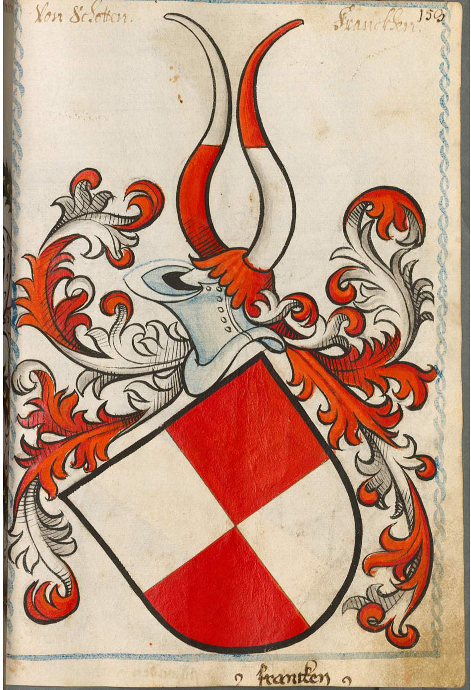 Scheibler'sches Wappenbuch , älterer Teil Schotten